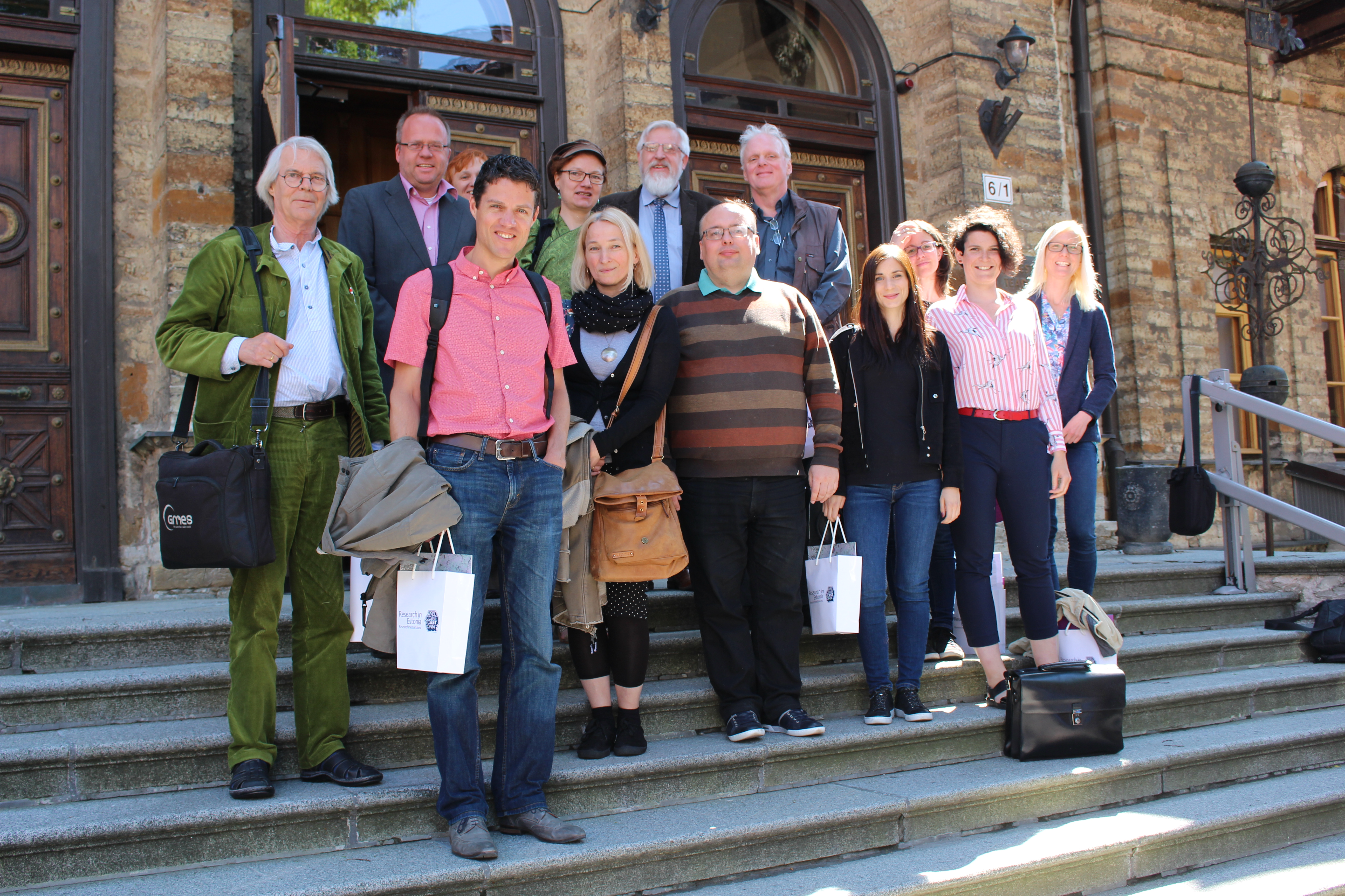 Välisteadusajakirjanikud 2017. aastal Eestis. Eesti Teaduste Akadeemia ees.